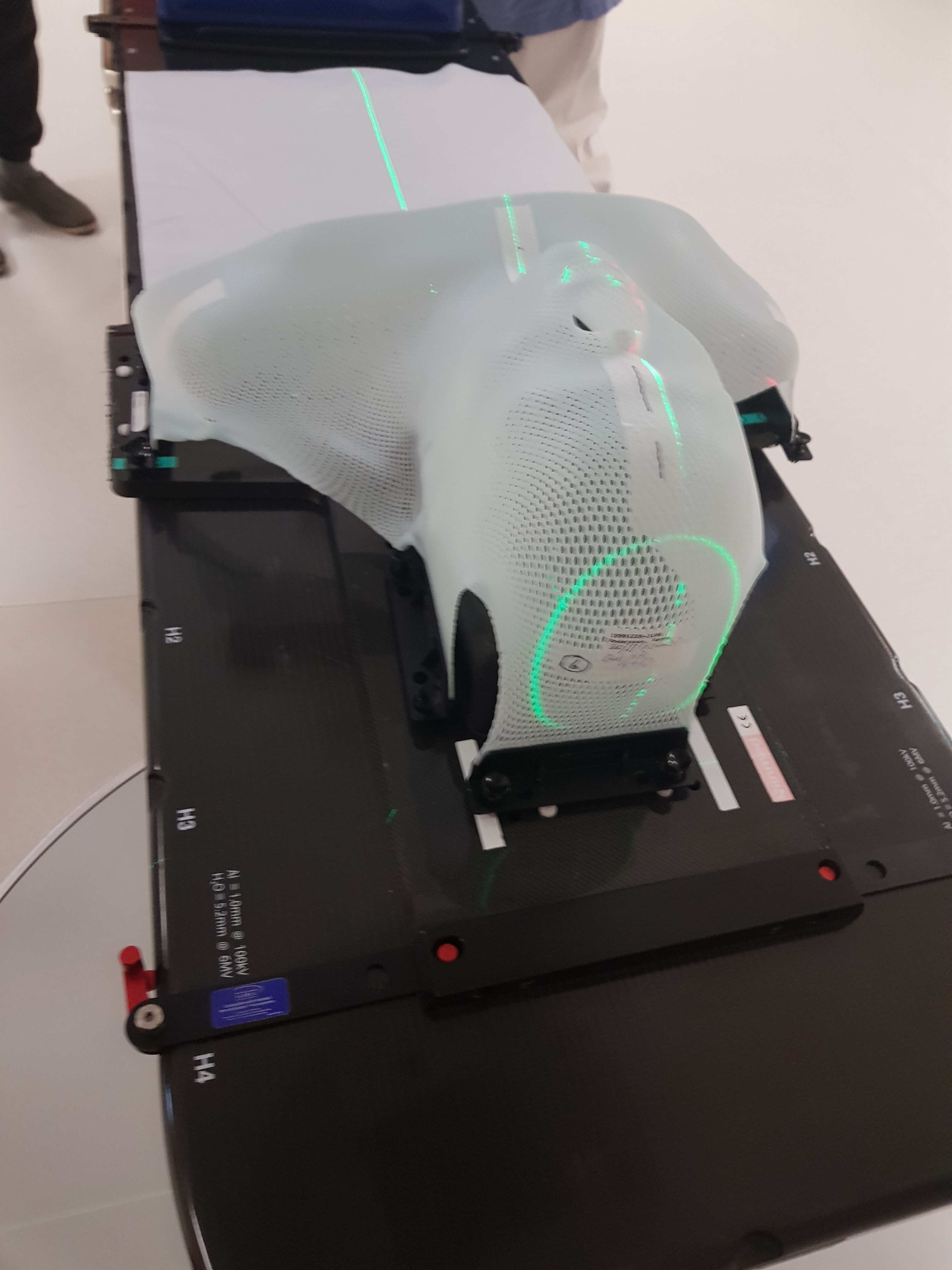 Kroppsmask formad efter patientens kropp för att stabilisera den i exakt position vid strålbehandling.